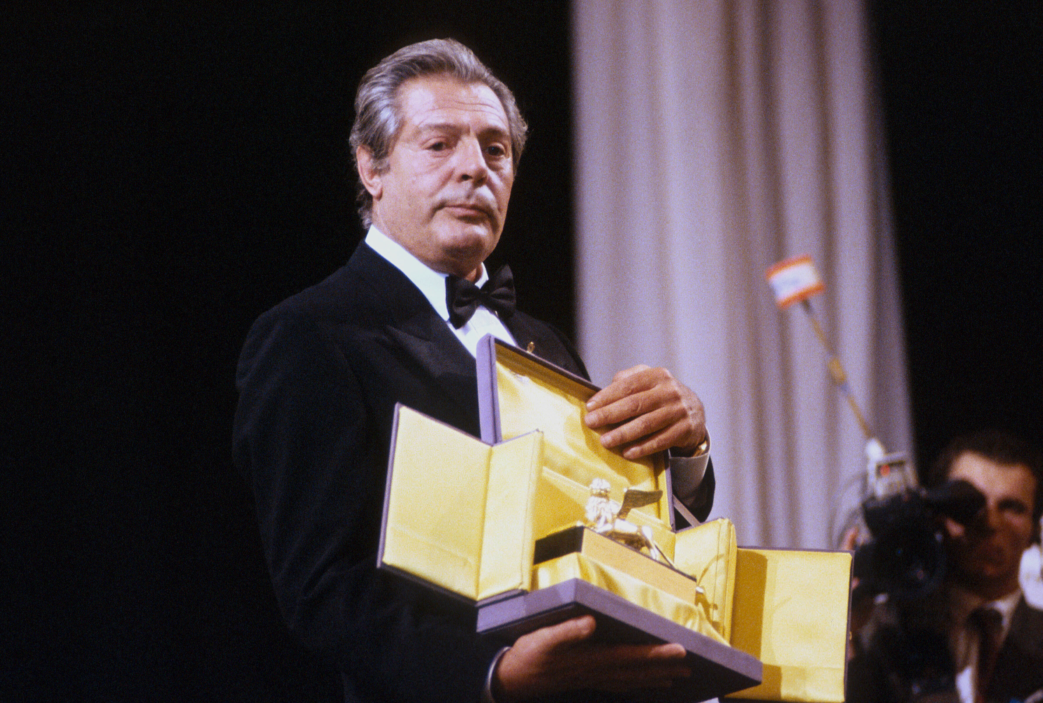 L'attore Marcello Mastroianni alla Mostra del Cinema di Venezia del 1990 riceve il Leone d'oro alla carriera